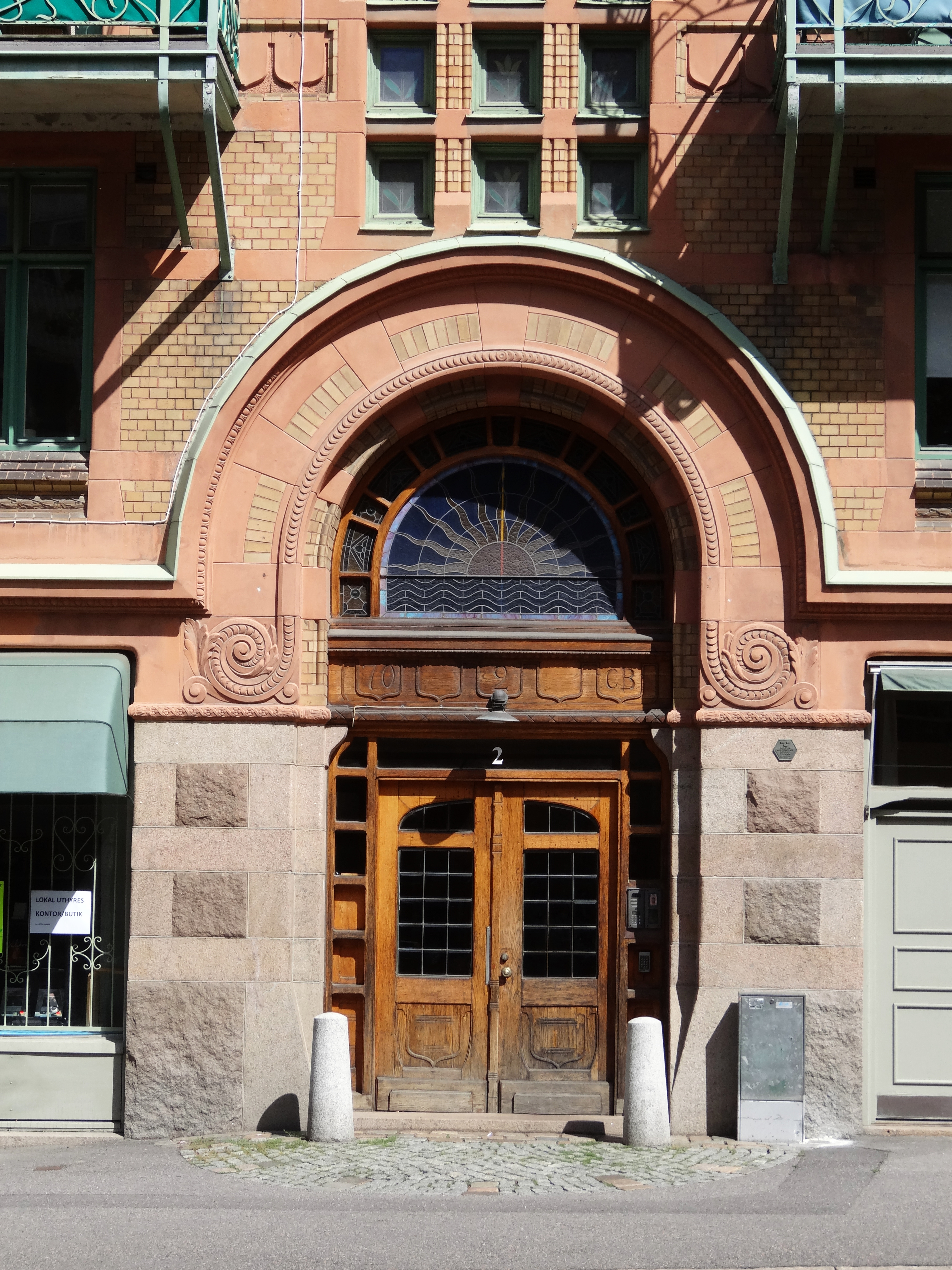 Bostadshus med sju våningar i stadsdelen Annedal.